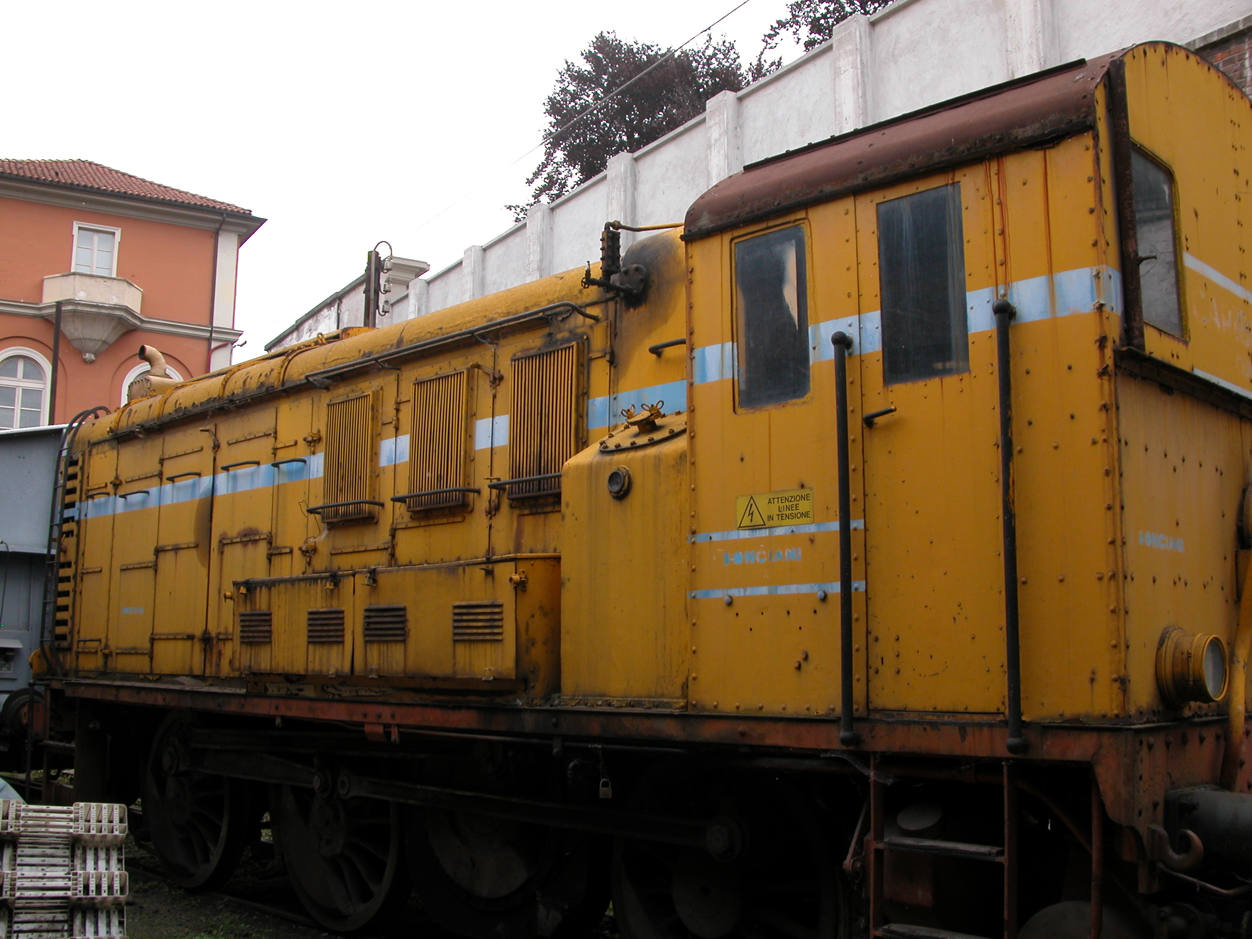 Locomotiva Diesel ex FS Ne 700.001, ex impresa Cariboni, acquisita dal Museo Ferroviario Piemontese, in attesa di recupero nella stazione di Torino P.M. (vista lato sinistro).